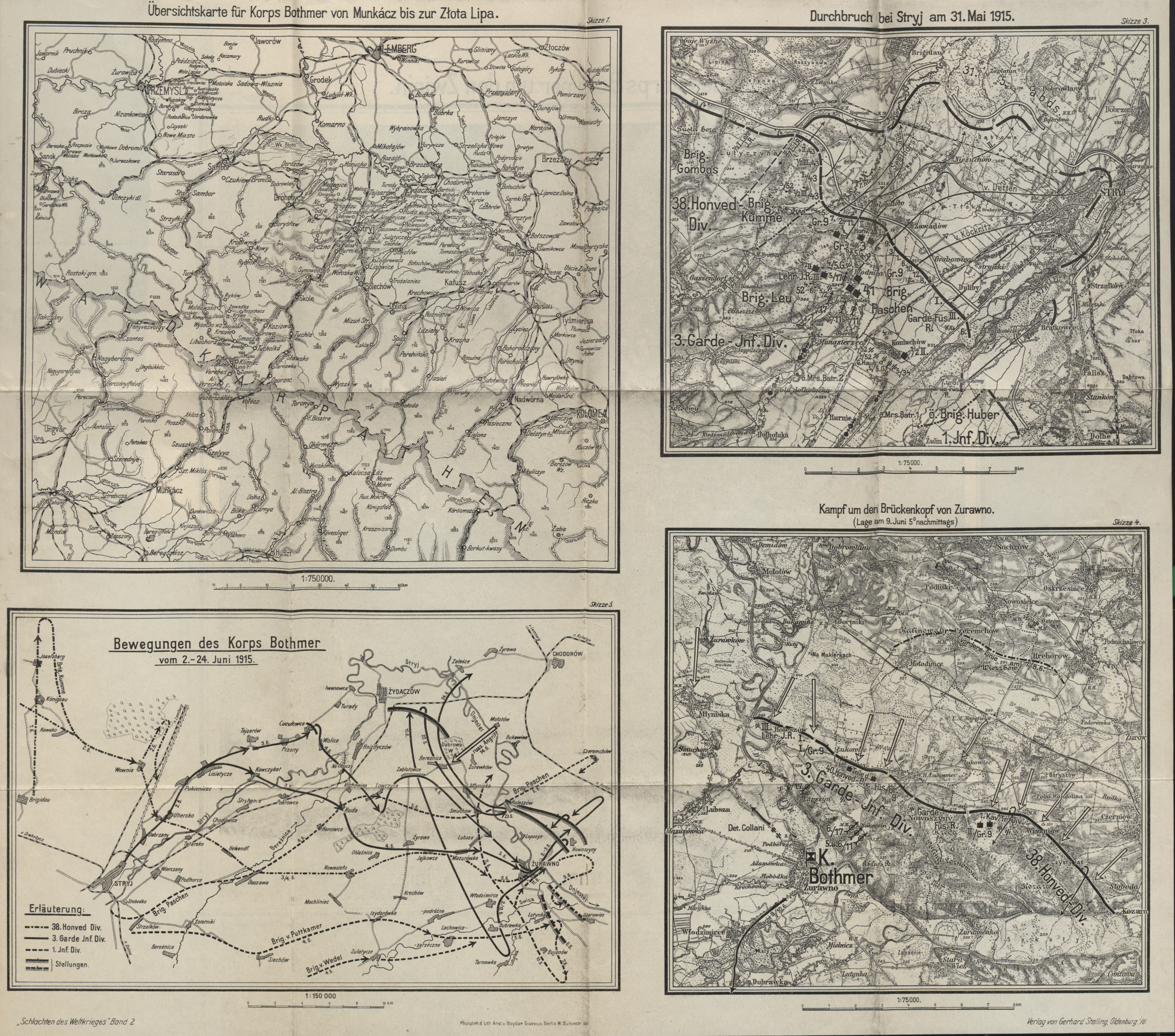 Die Bewegungen des Korps Bothmer